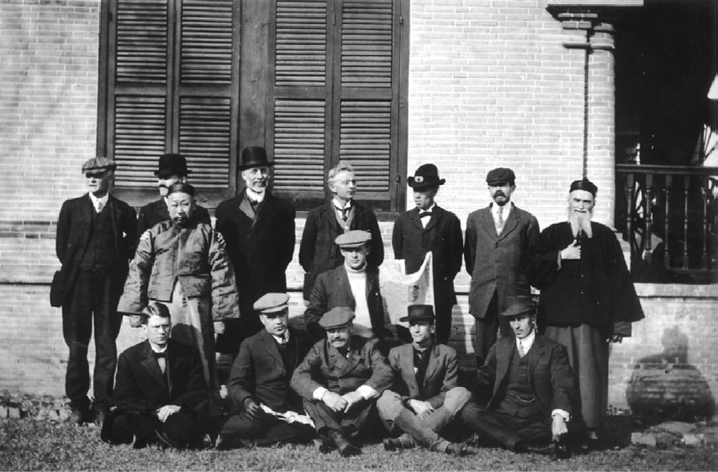 1910年汇文书院附中中外教员在校园内合影，前排右一为包文校长。（孙熹圣珍藏照片）